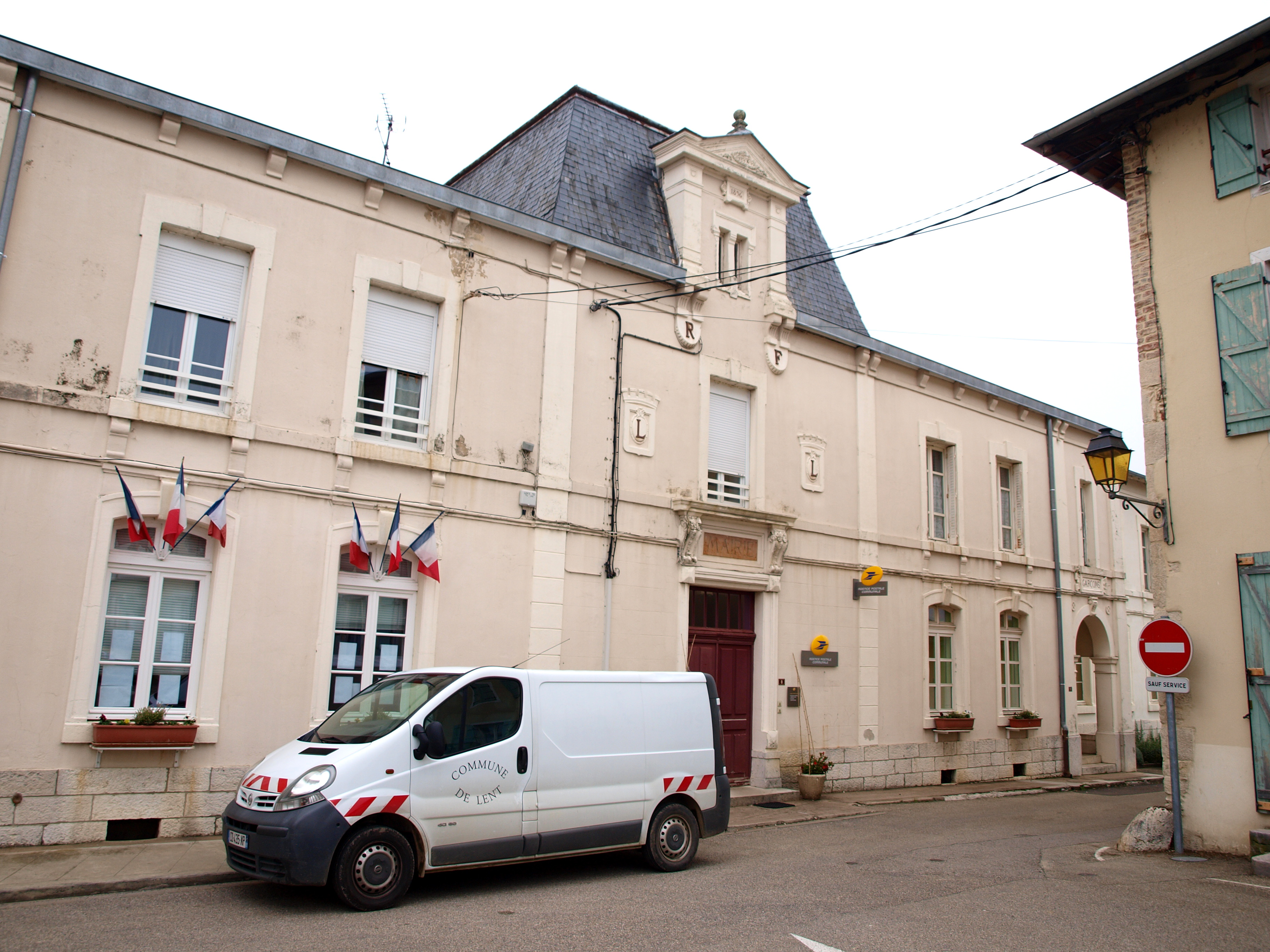 Lent (Ain, France) ; mairie